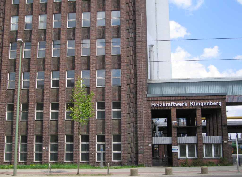 Haupteingang Kraftwerk Klingenberg 2006